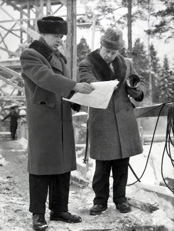 Tapiolan Cityn peruskiven muuraus vuonna 1958. Vasemmalla Heikki von Hertzen (1913–1985) lukee perustamiskirjaa, oikealla Jorma Aaltonen.